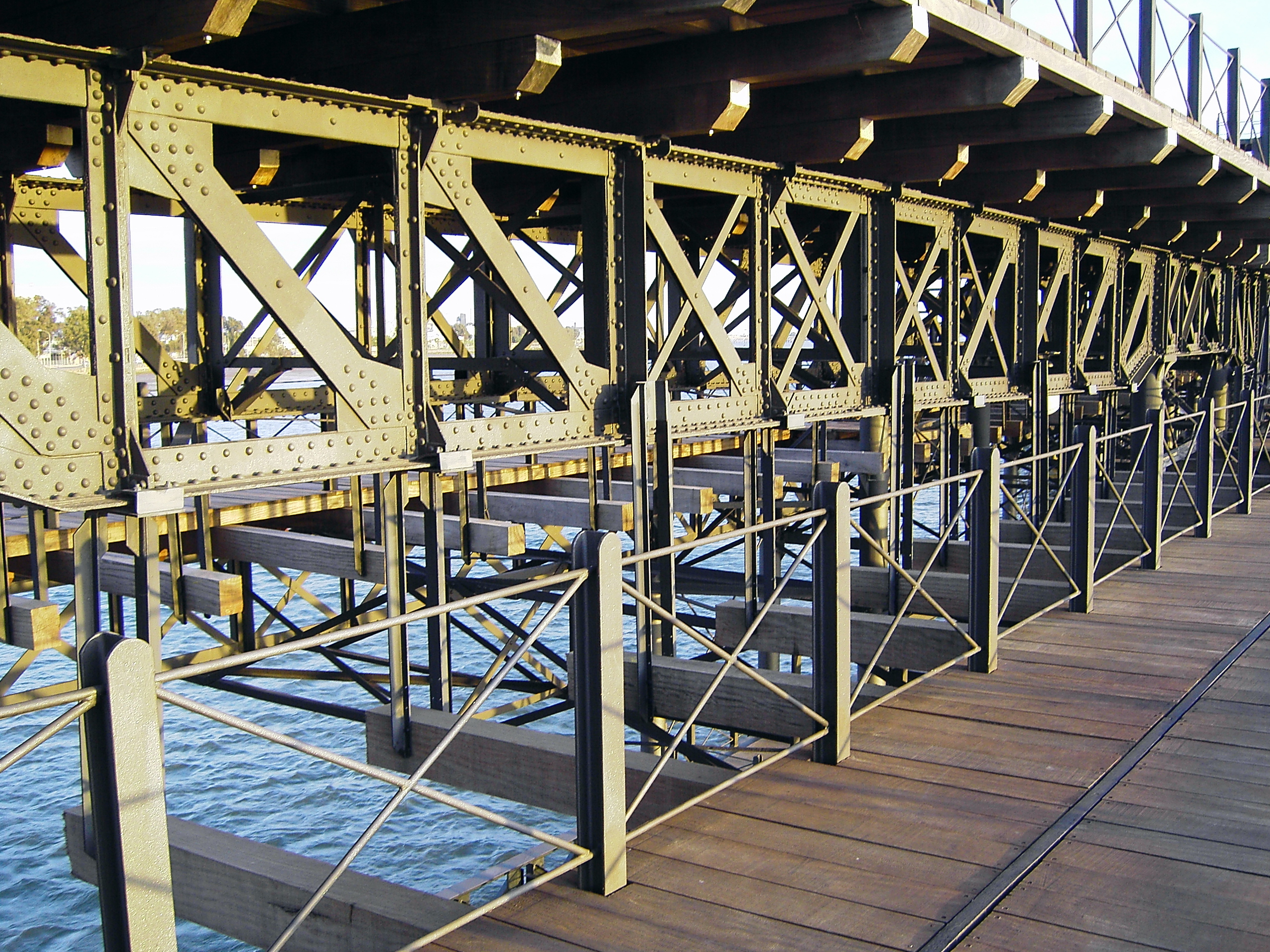 Muelle del Tinto 2007